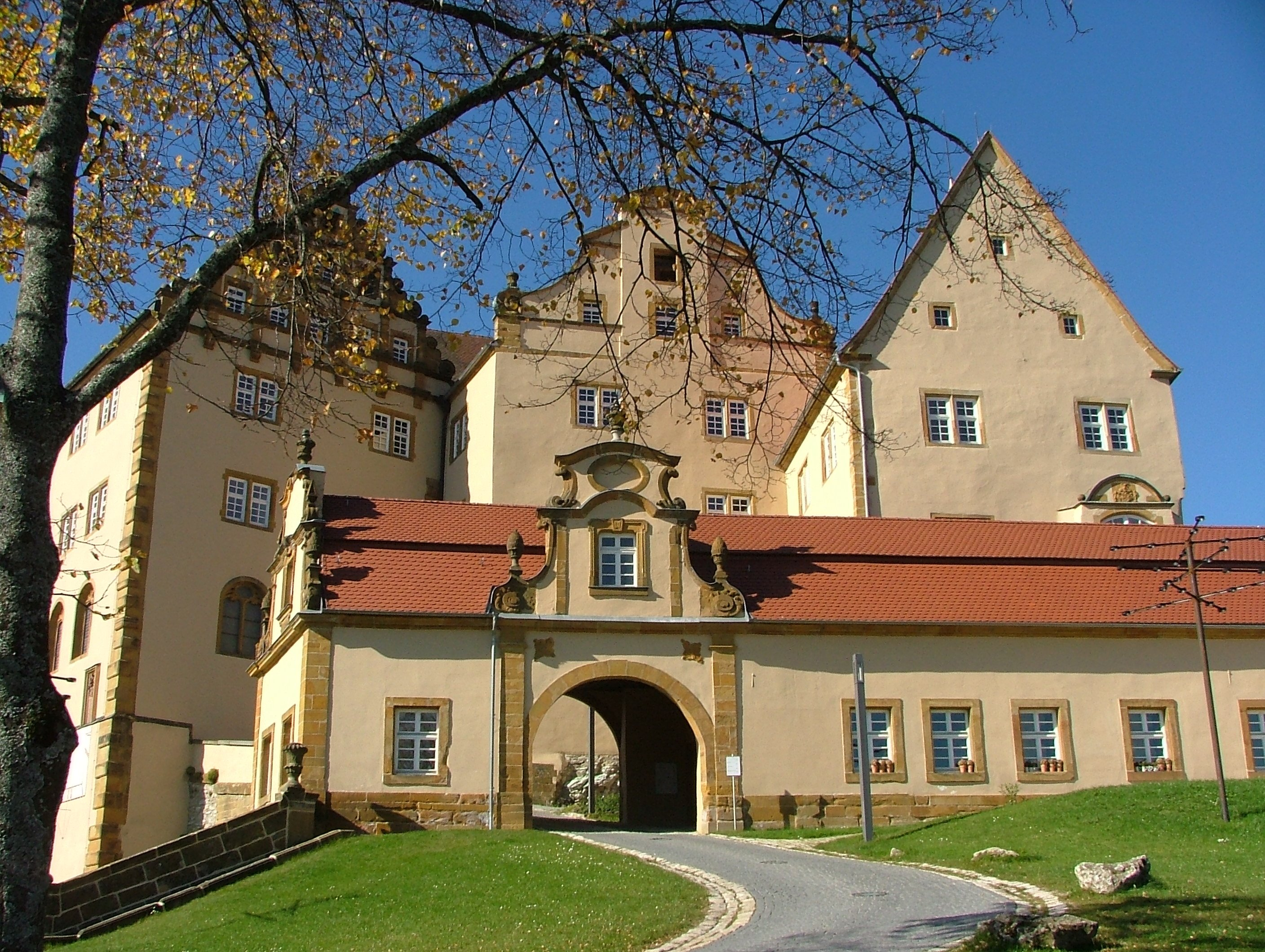 Kapfenburg